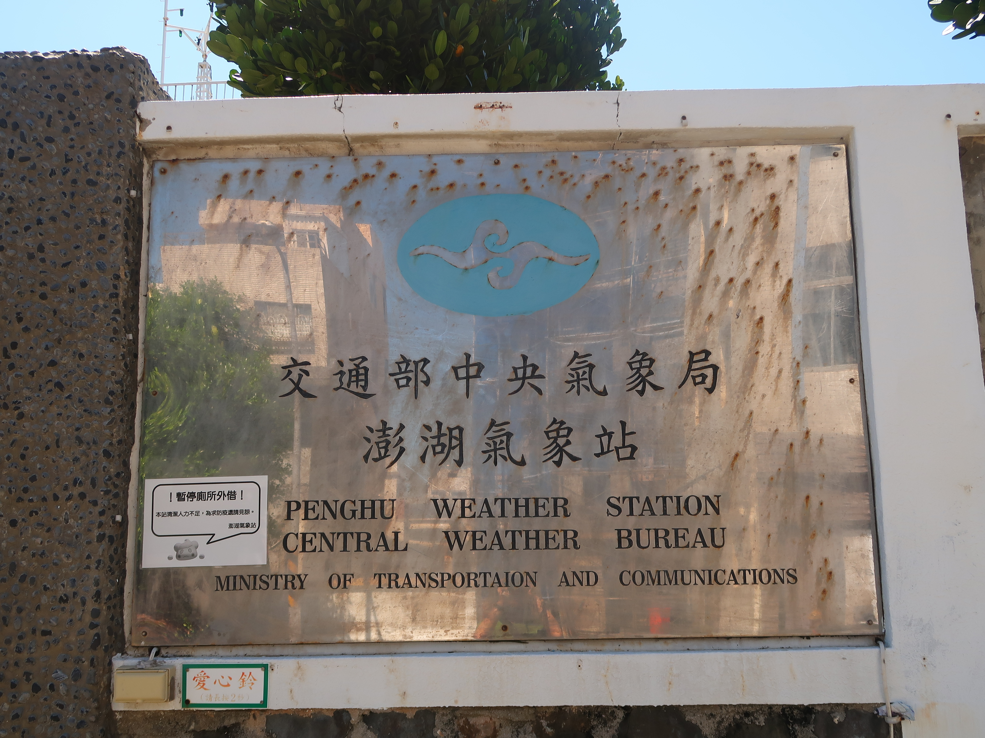 澎湖氣象站，創立於1896年，地址：馬公市復興里新興路2號